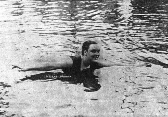 Annette Kellerman, australische Schwimmerin, während ihrer Schwimmtour durch die Donau im Juni 1906